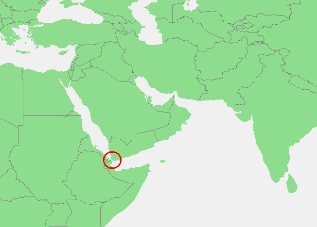 Bab el Mandeb